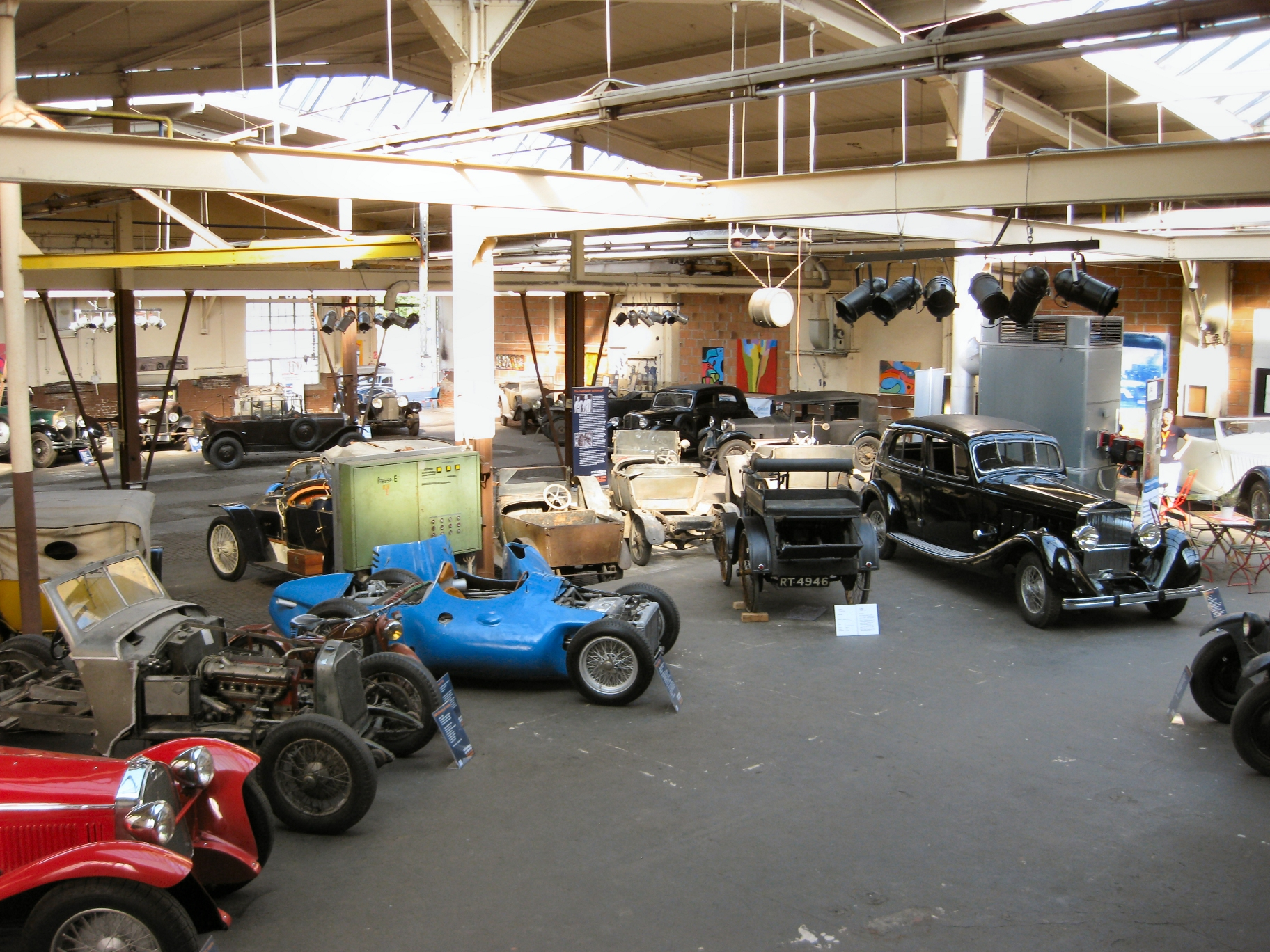 Blick auf Ausstellung Schlumpf-Depot 2013 Kassel